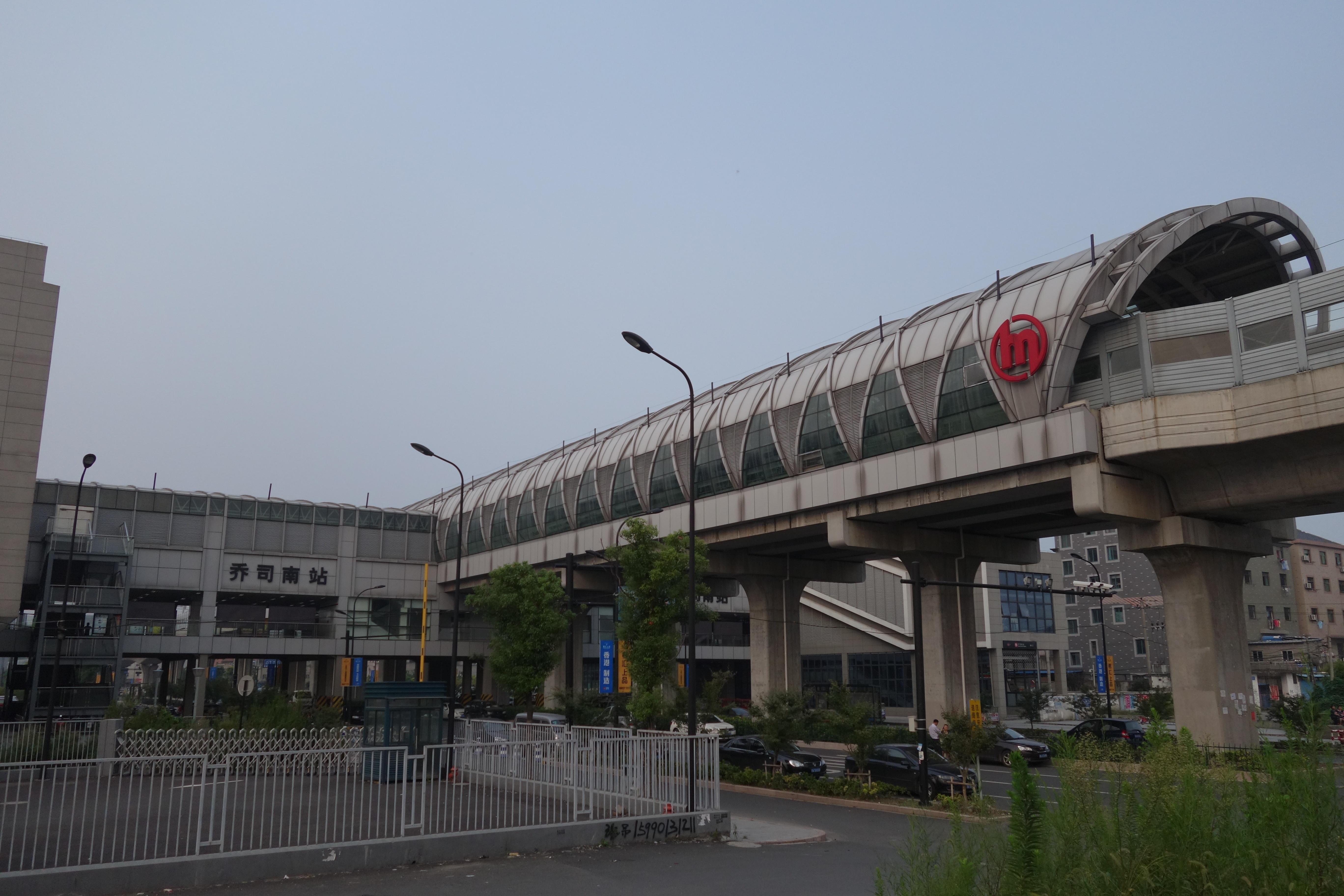 高架乔司南站